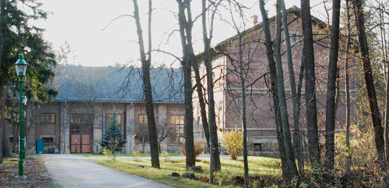 Schöpfwerk Pottschach der I. Wiener Hochquellenwasserleitung